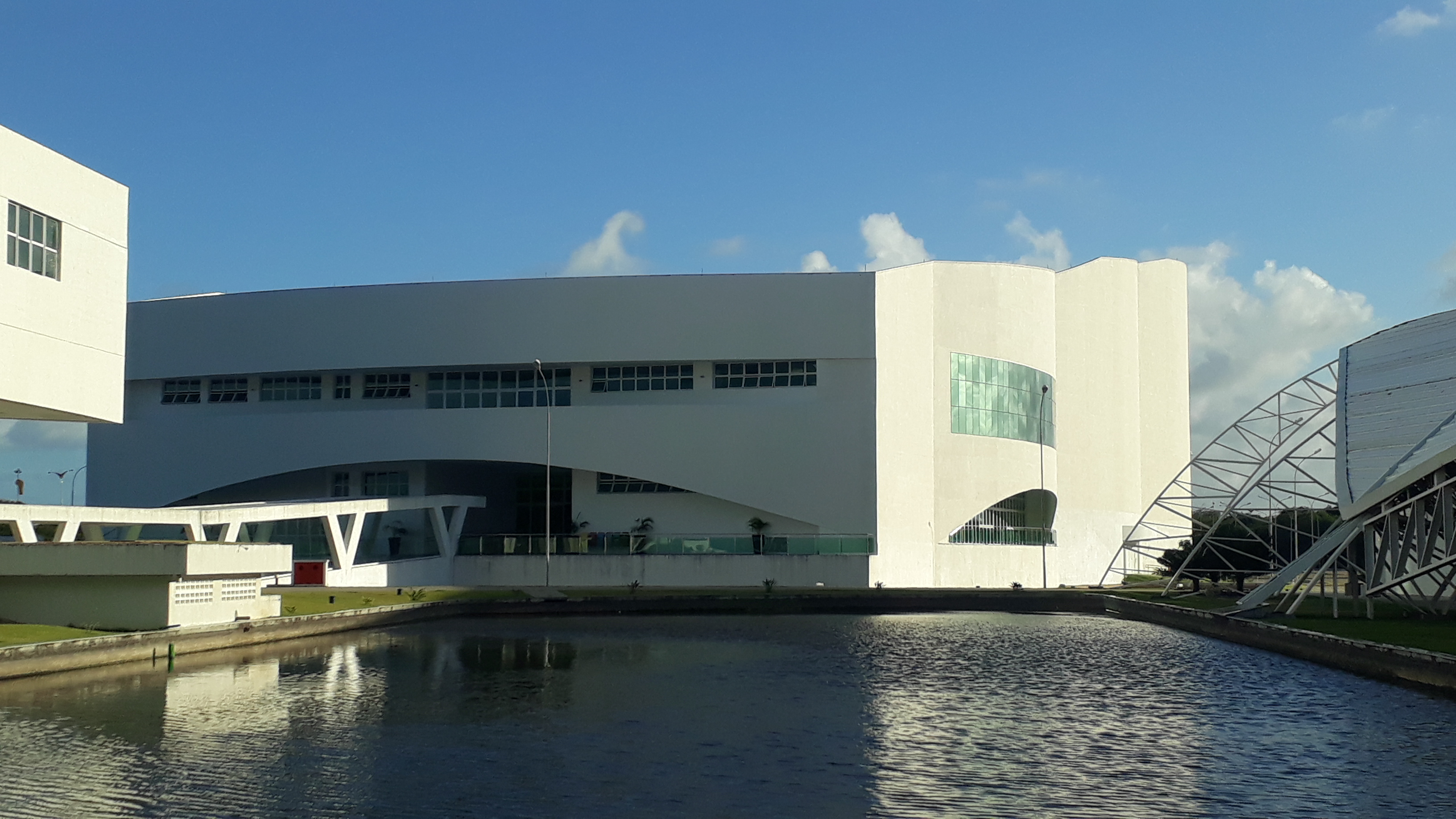 Fachada do Teatro Pedra do Reino em João Pessoa Paraíba.